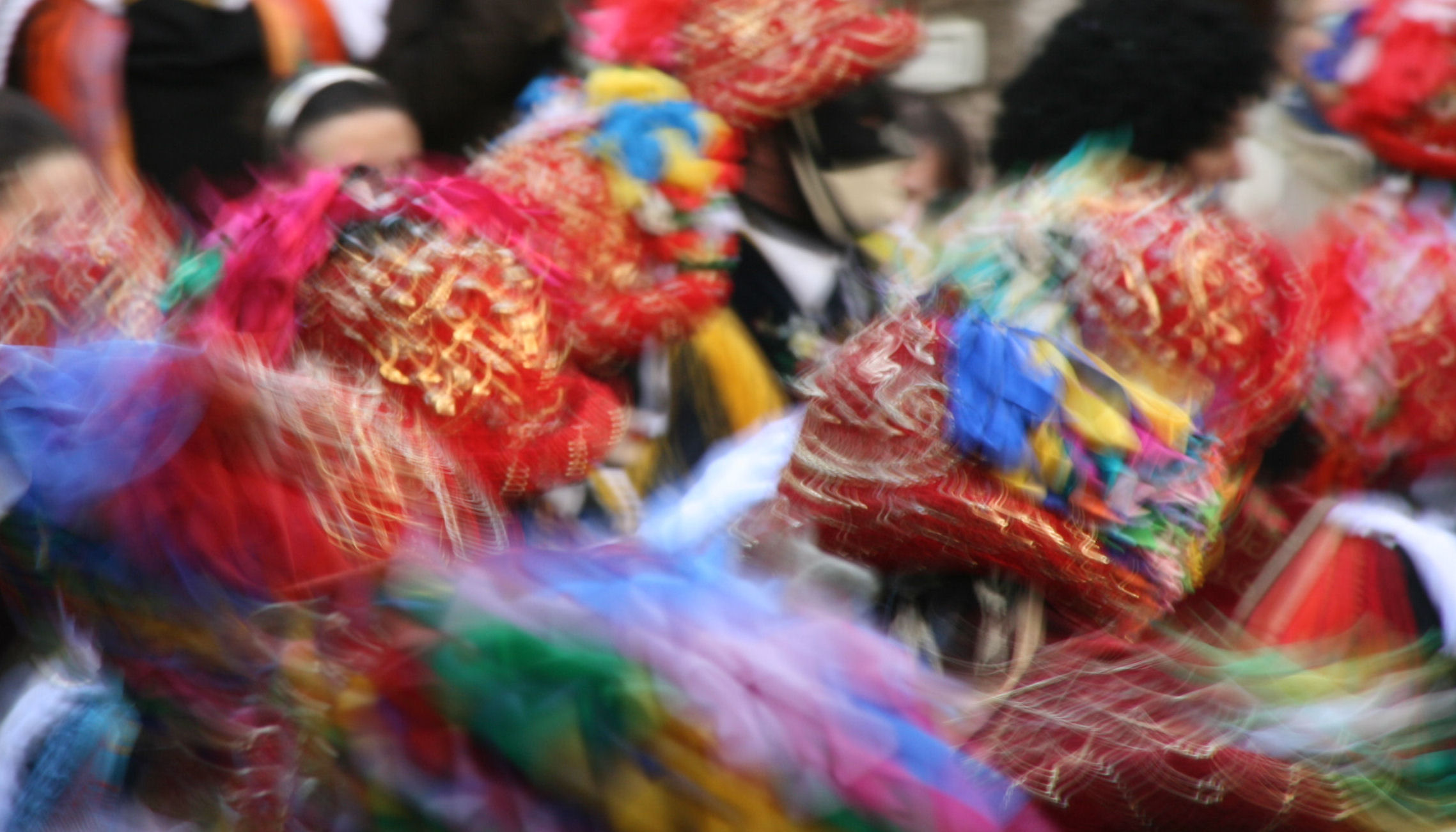 Bagolino ballo dei ballerini